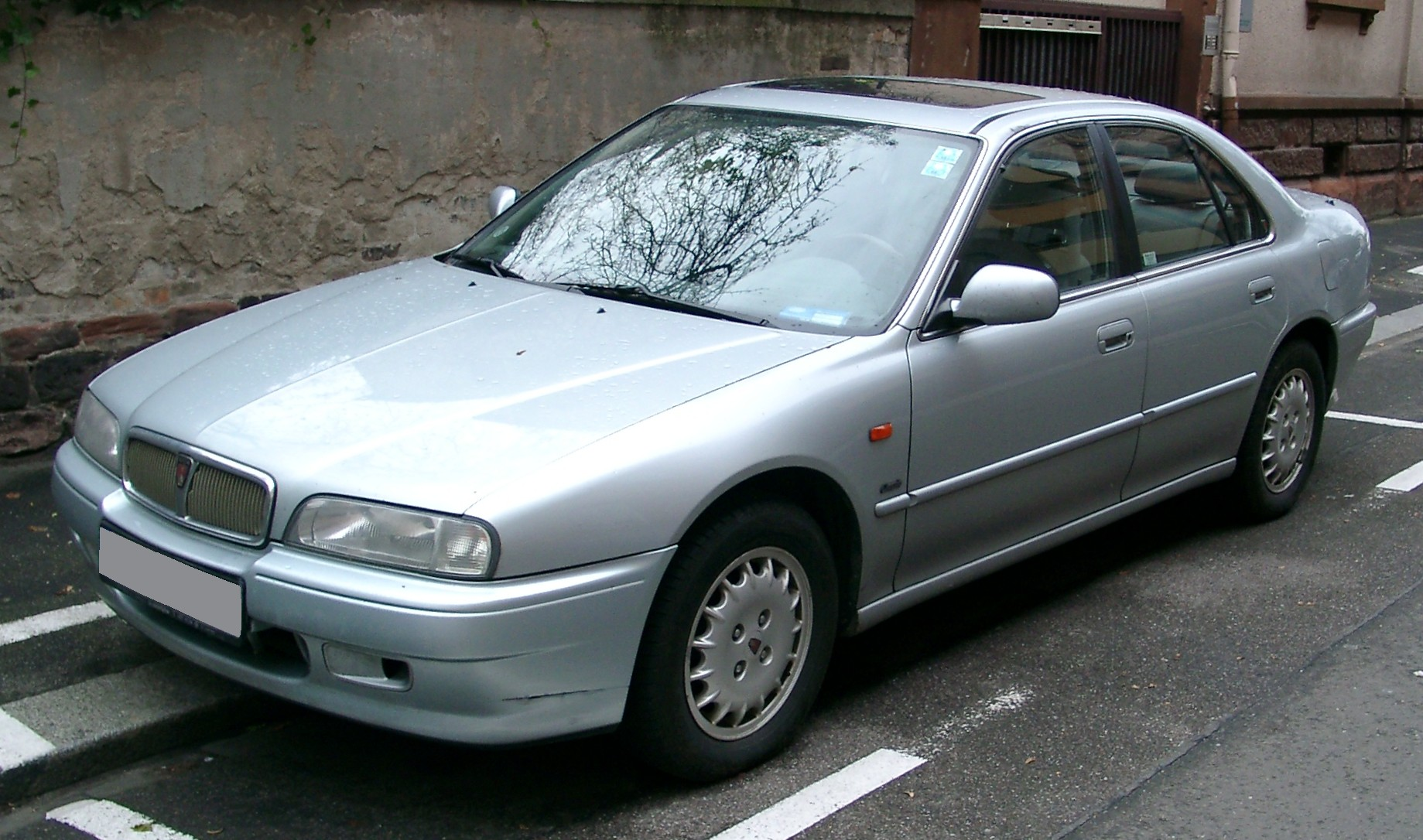 Rover 600